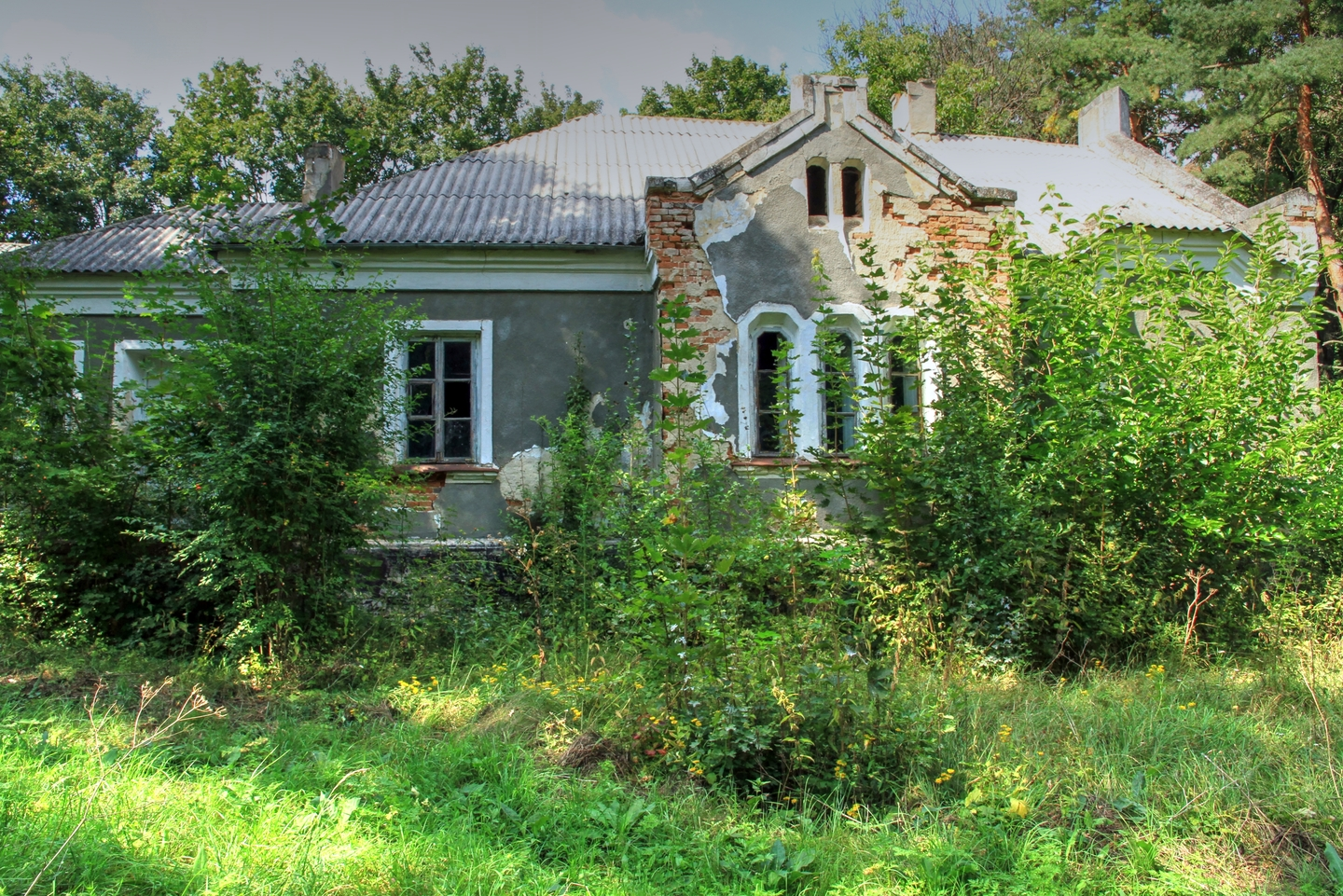 Хинкэуцкий парк, монумент природы, находится в Единецкий район, с. Хинкэуць (код MD-ED-map-014)